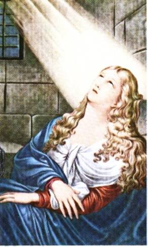 Quadro raffigurante Sant'Agata al carcere custodito nell'omonima chiesa catanese